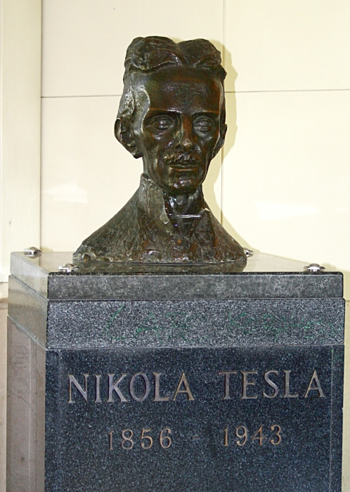 Spomenik Nikoli Tesli u zgradi Fakulteta elektrotehnike i računarstva u Zagrebu